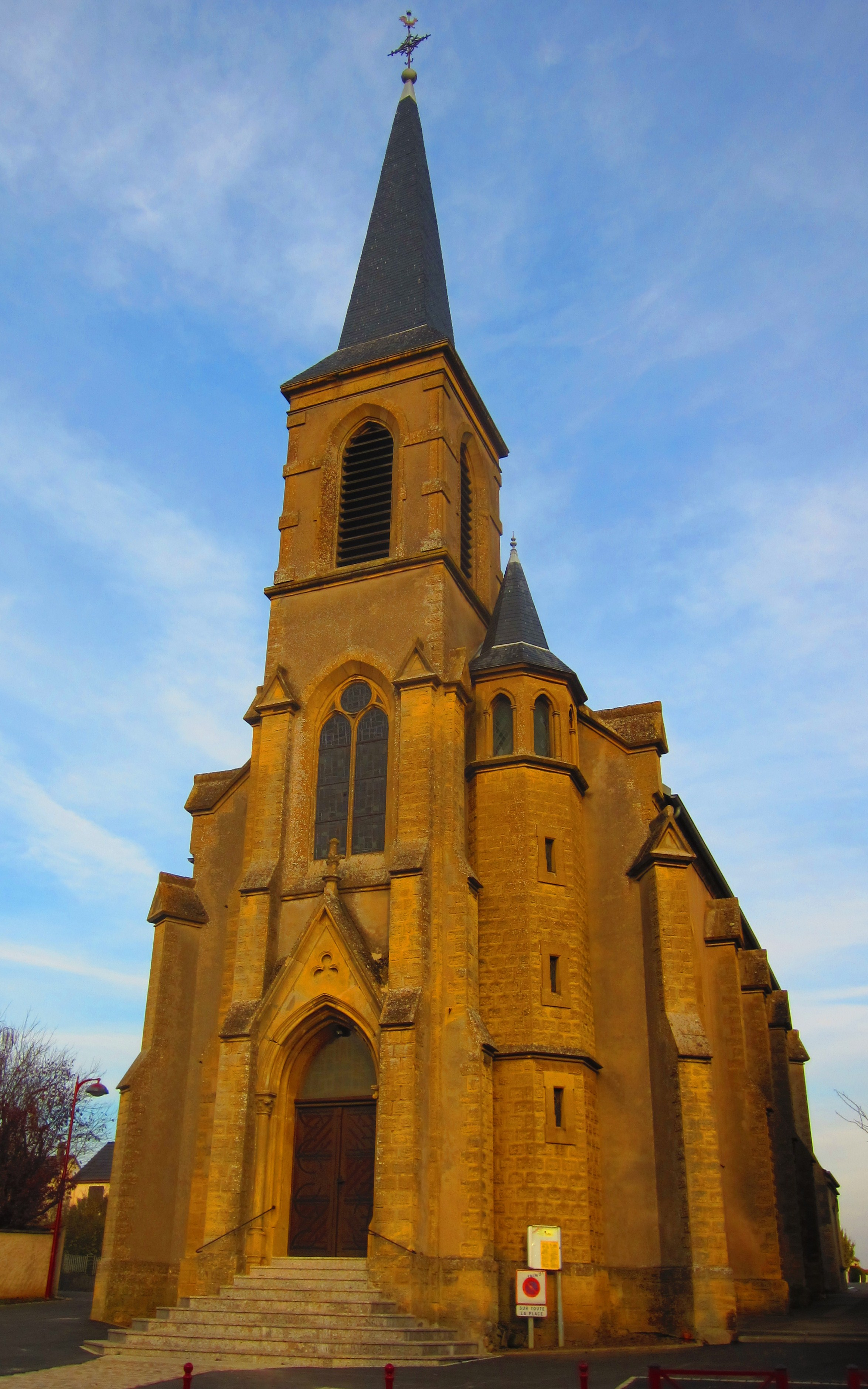 Description eglise Kuntzig eglise Kuntzig